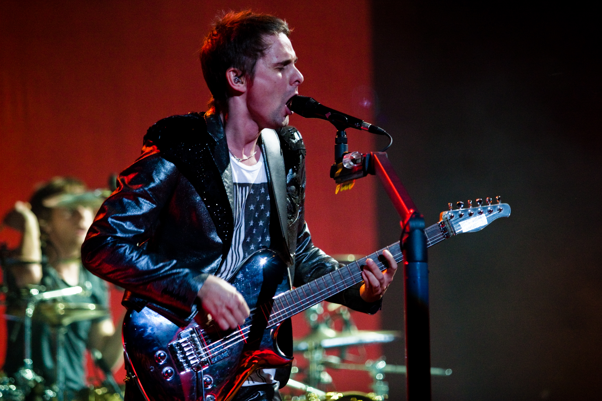 Muse-2